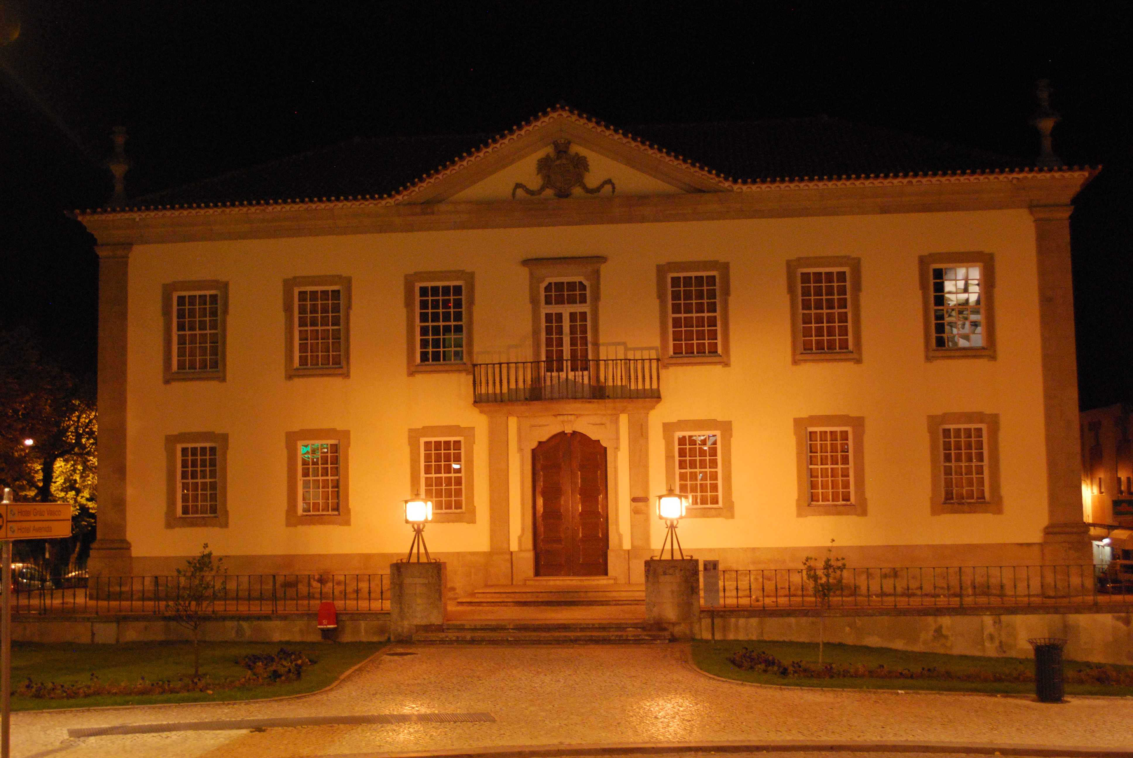 Edifício do Arquivo Distrital / Biblioteca Municipal de Viseu / Casa Amarela This file was uploaded for Wiki Loves Monuments in Portugal with the unique identifier 97007070.